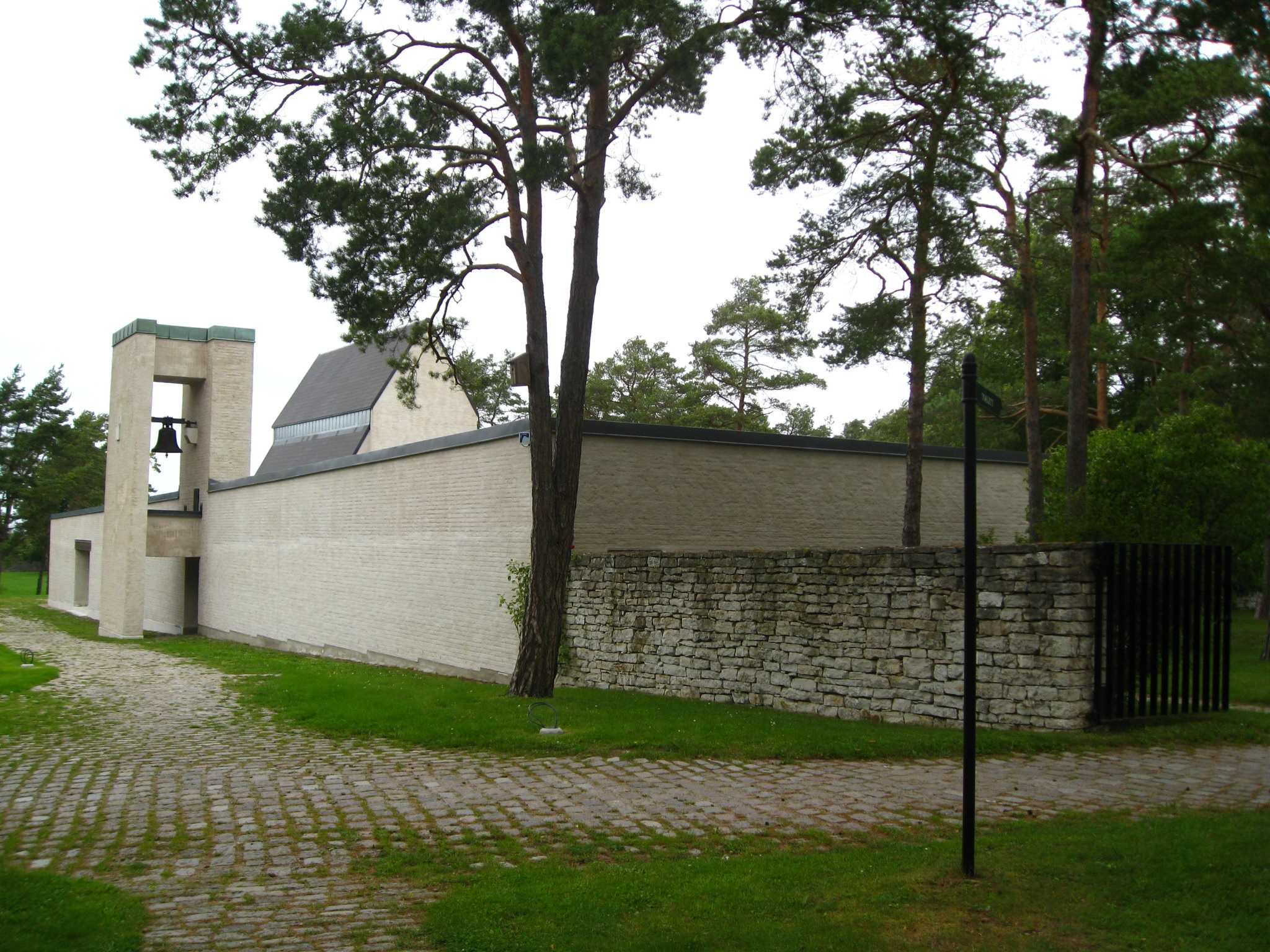 Krematoriets S fasad.